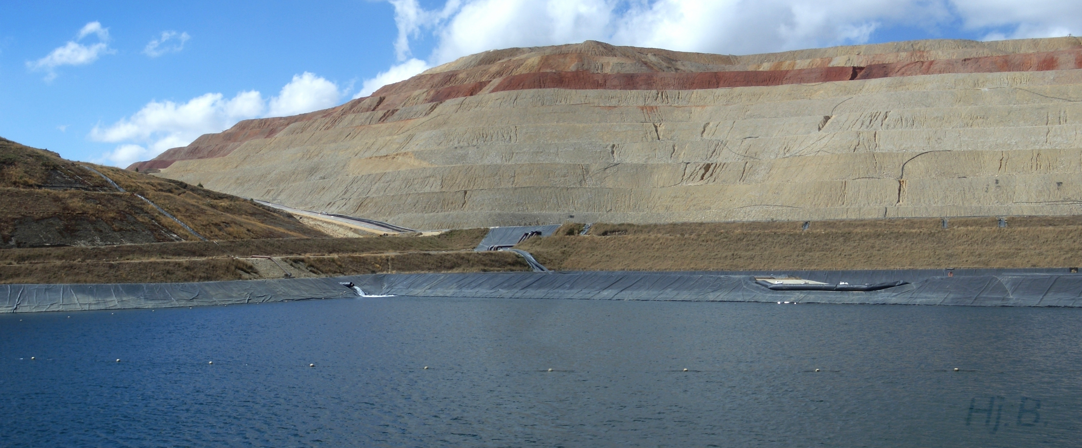 Sammelbecken für goldhaltiges Wasser (Goldmine Yanacocha, bei Cajamarca - Peru)